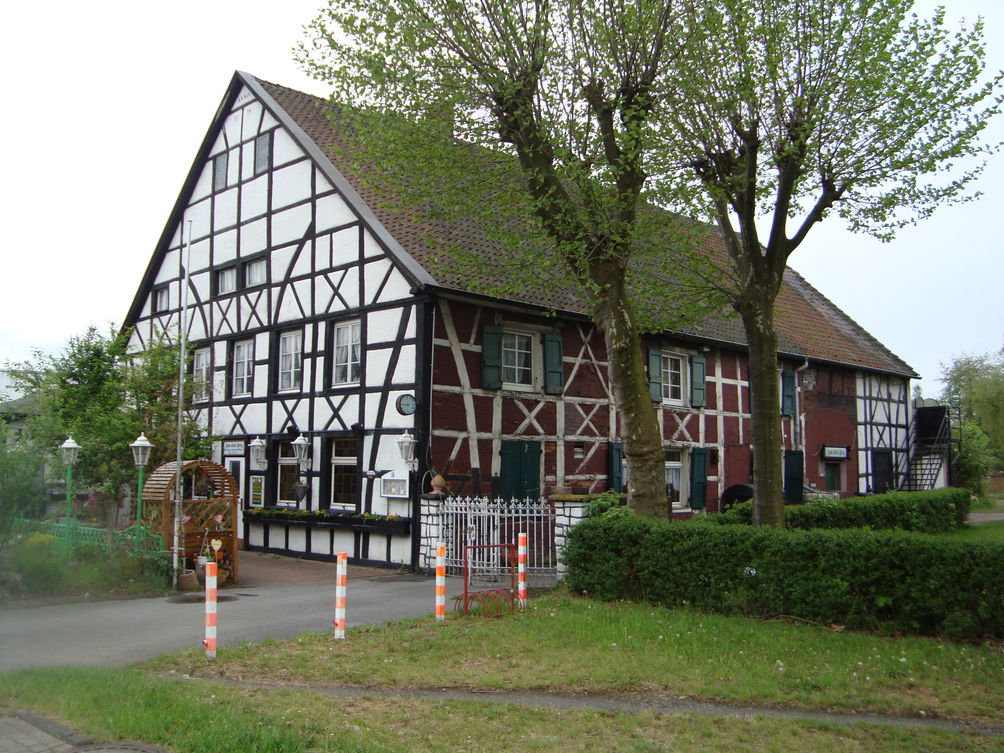 Gaststätte Zum alten Fritz in Herne-Hosterhausen. Das aus dem Jahre 1775 stammende Gasthaus, seit dem 19. Jahrhundert als „Schlenkhoffscher Kotten“ bekannt, ist das älteste Denkmal am Gahlenschen Kohlenweg[1] This is the photograph of an architectural monument. It is part of the list of cultural monuments of Herne, no. 646